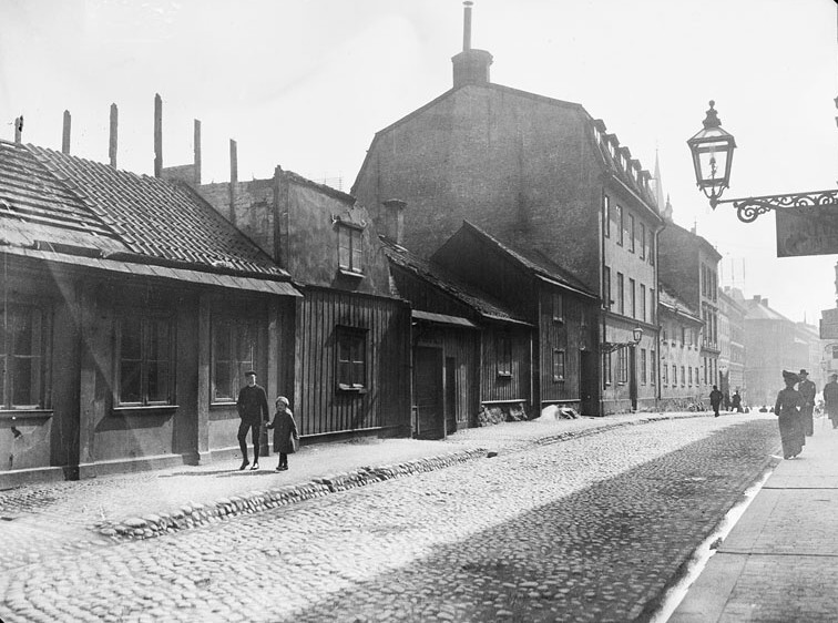 Döbensgatan 26-30 i Stockholm, byggnaderna revs år 1904